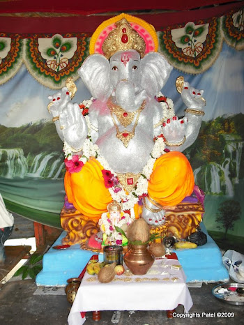 ગુજરાતી: Vachhavad10